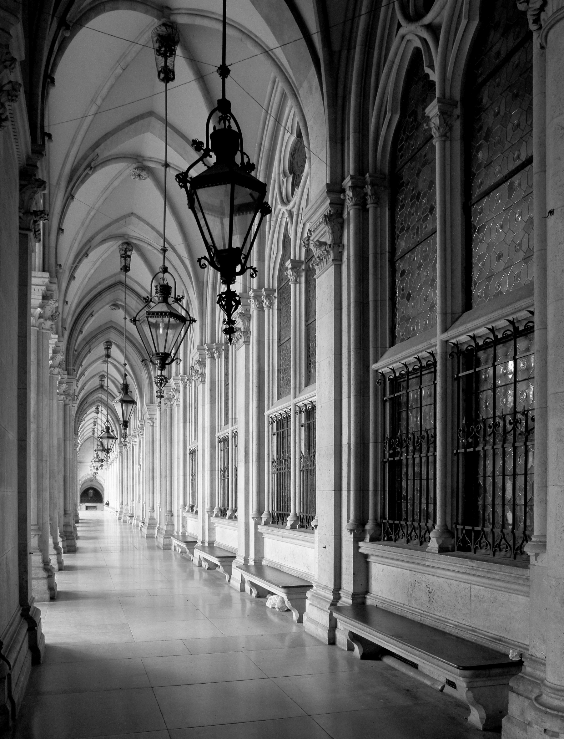 Linker Arkadengang an der Vorderseite des neogotischen Wiener Rathauses.